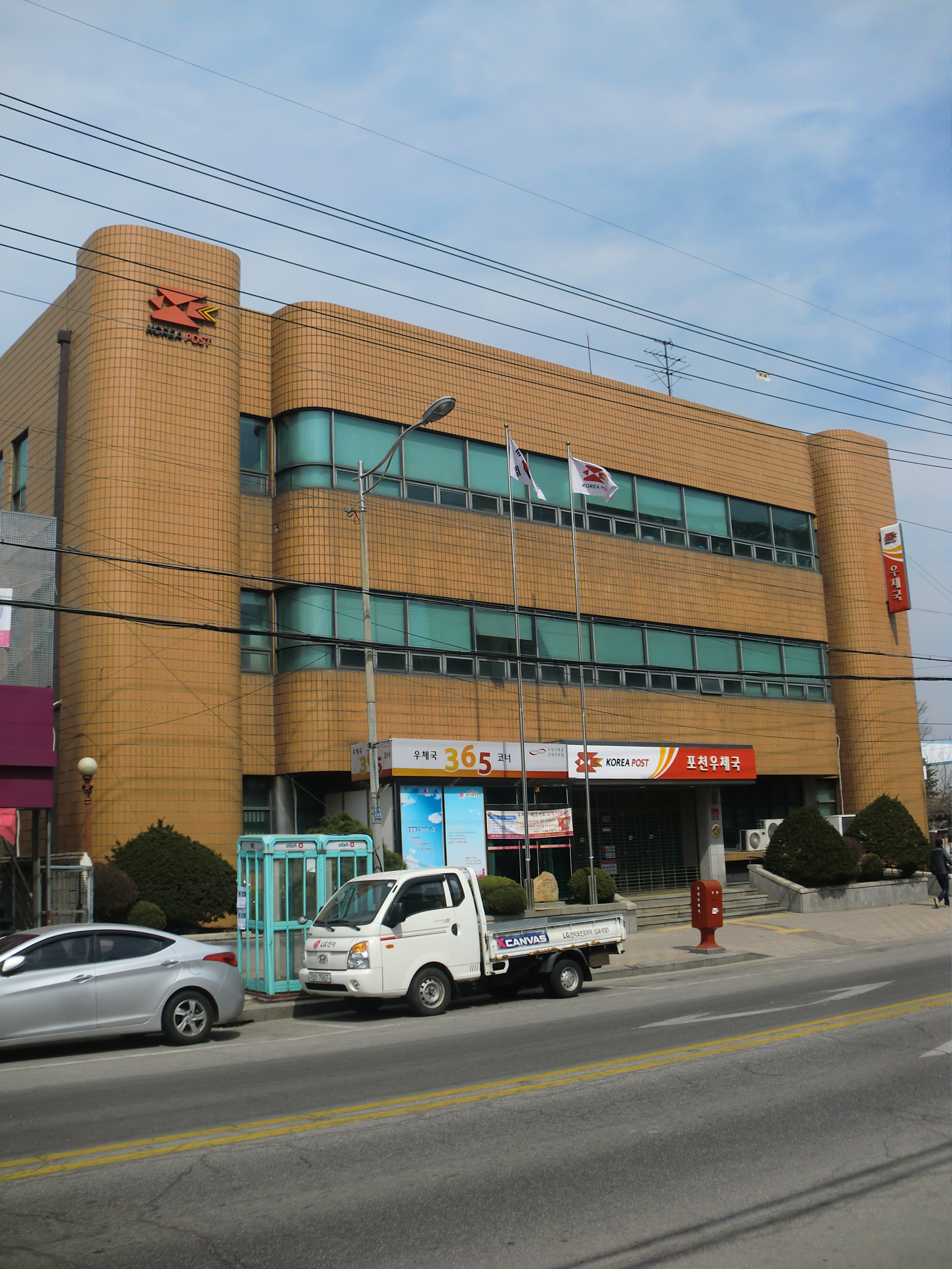 경기도 포천시에 있는 포천우체국